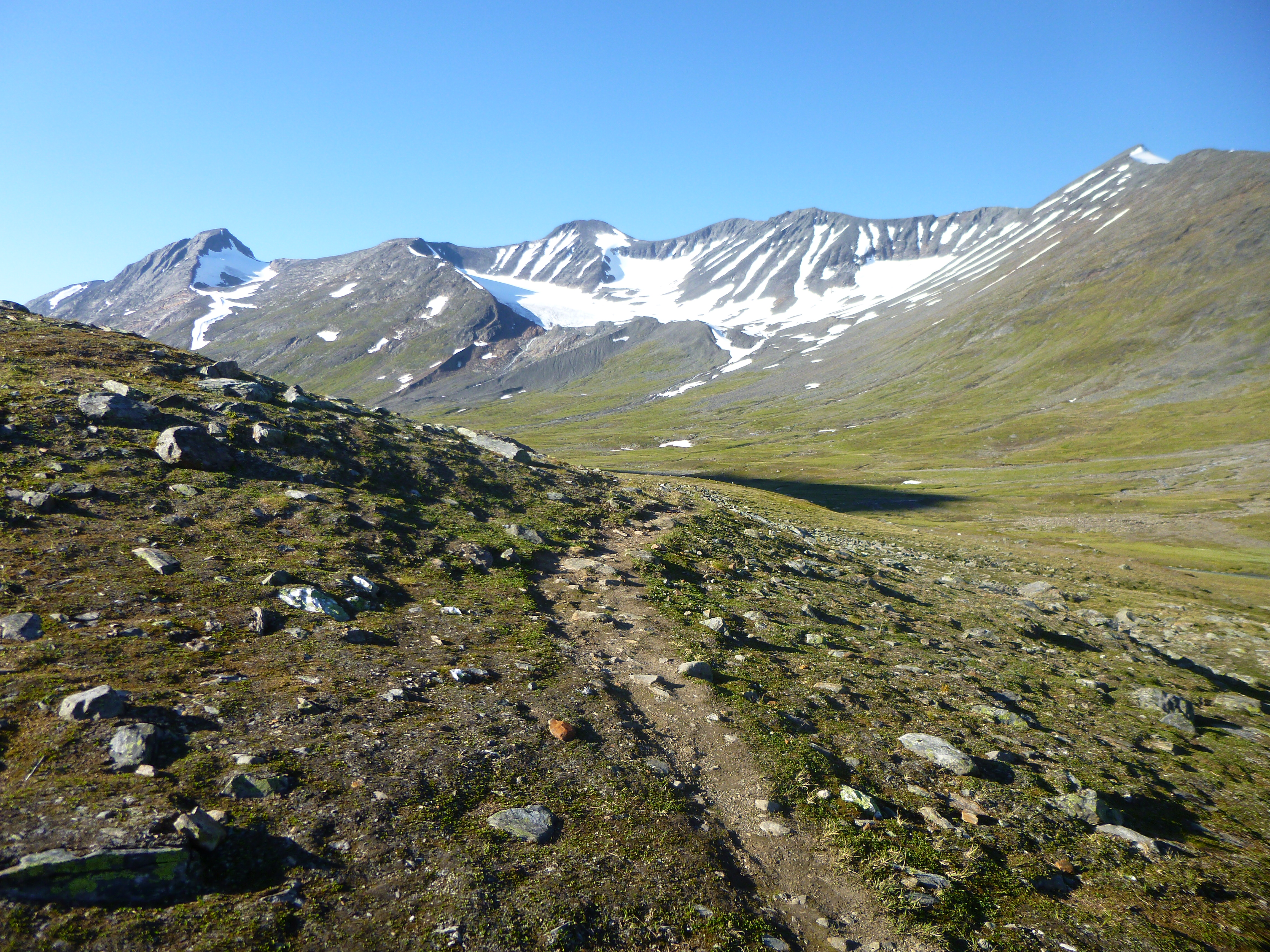 Spår och små väg i Sarek längs Nijakjåkka